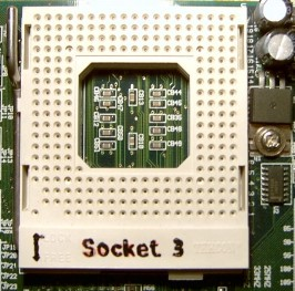 Socket 3